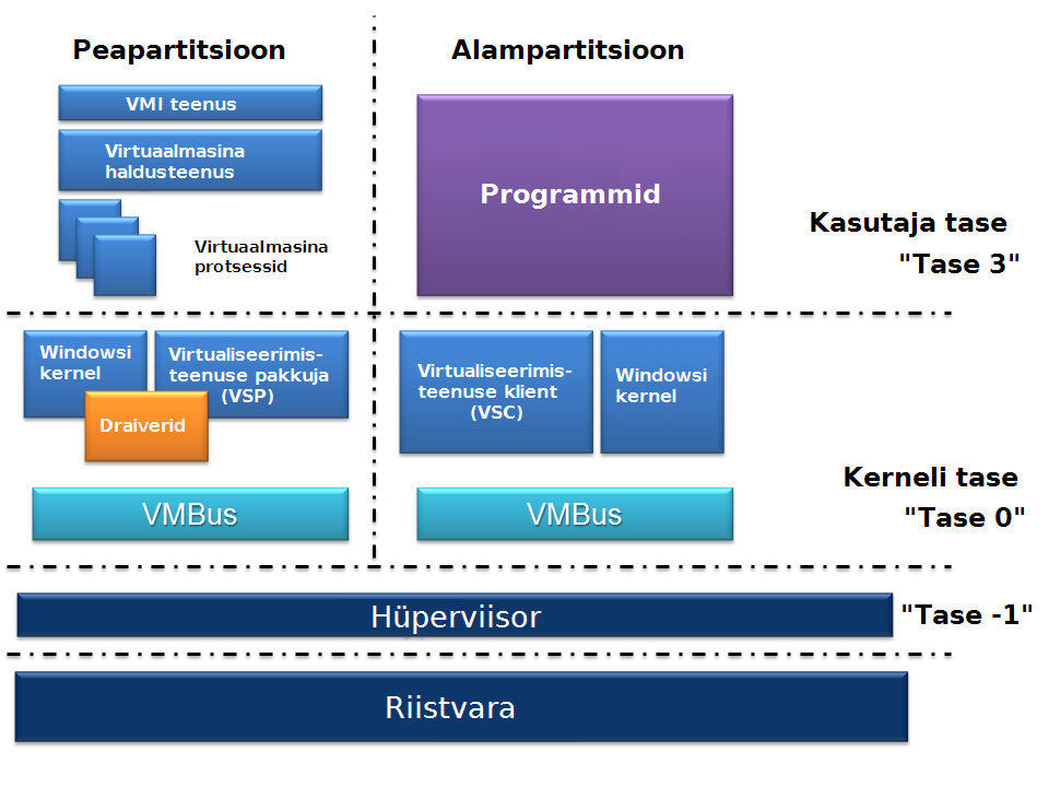 Hyper-V eestikeelne ülesehitus. Originaalpilt